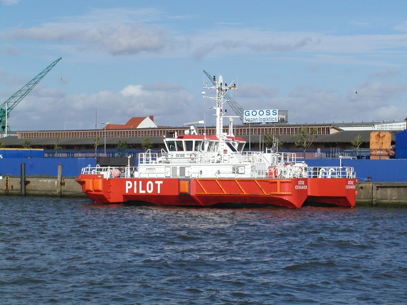 SWATH Pilot Döse